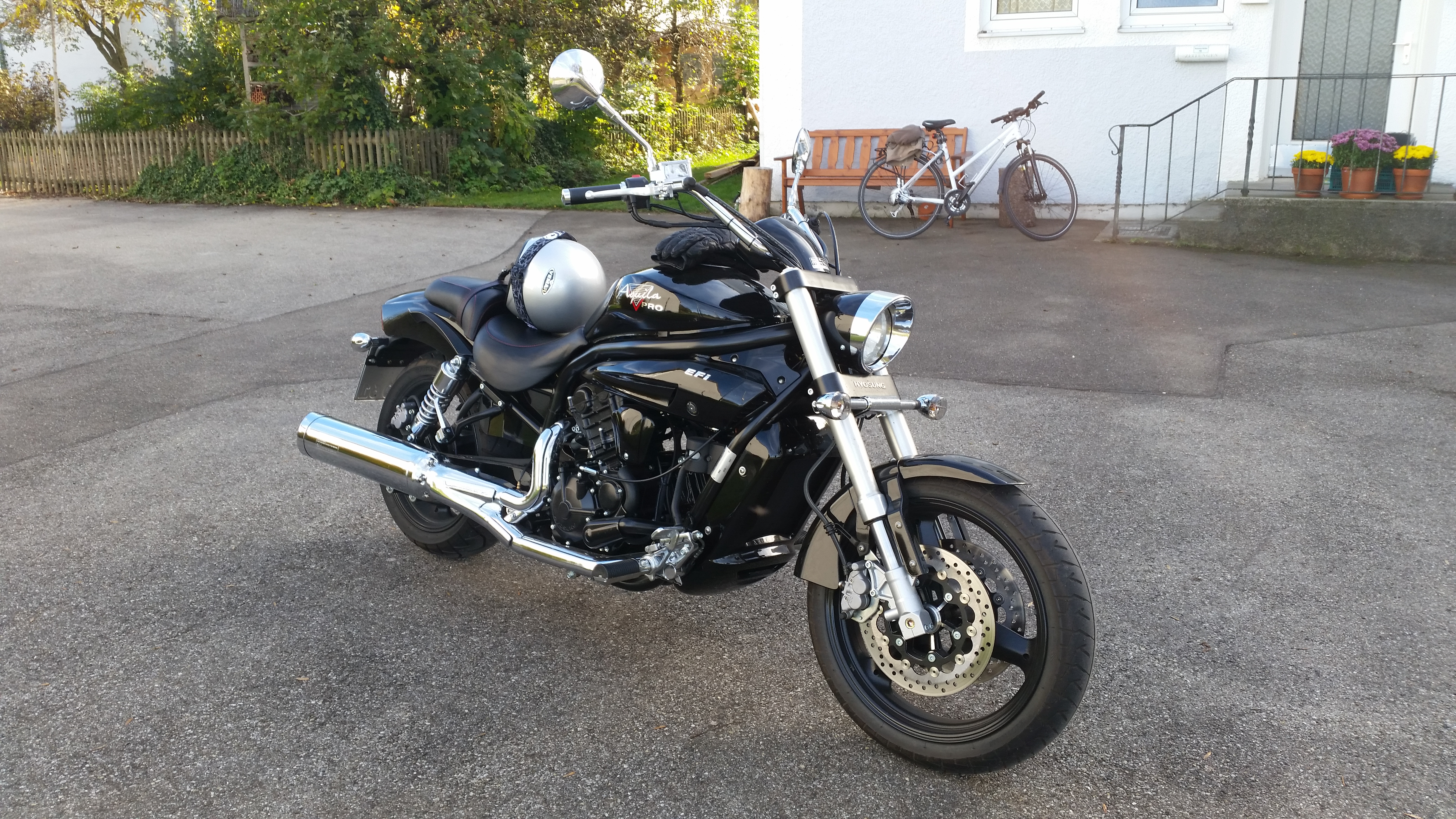 Hyosung GV 650 Aquila